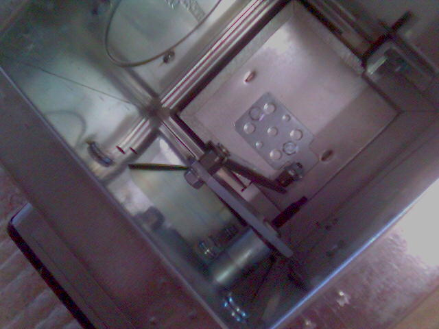 Innenleben einer Brandschutzklappe für die Kanalmontage. Sichtbar: Klappenblatt bestehend aus F90, Revisionsöffnung, Stellungsgestänge